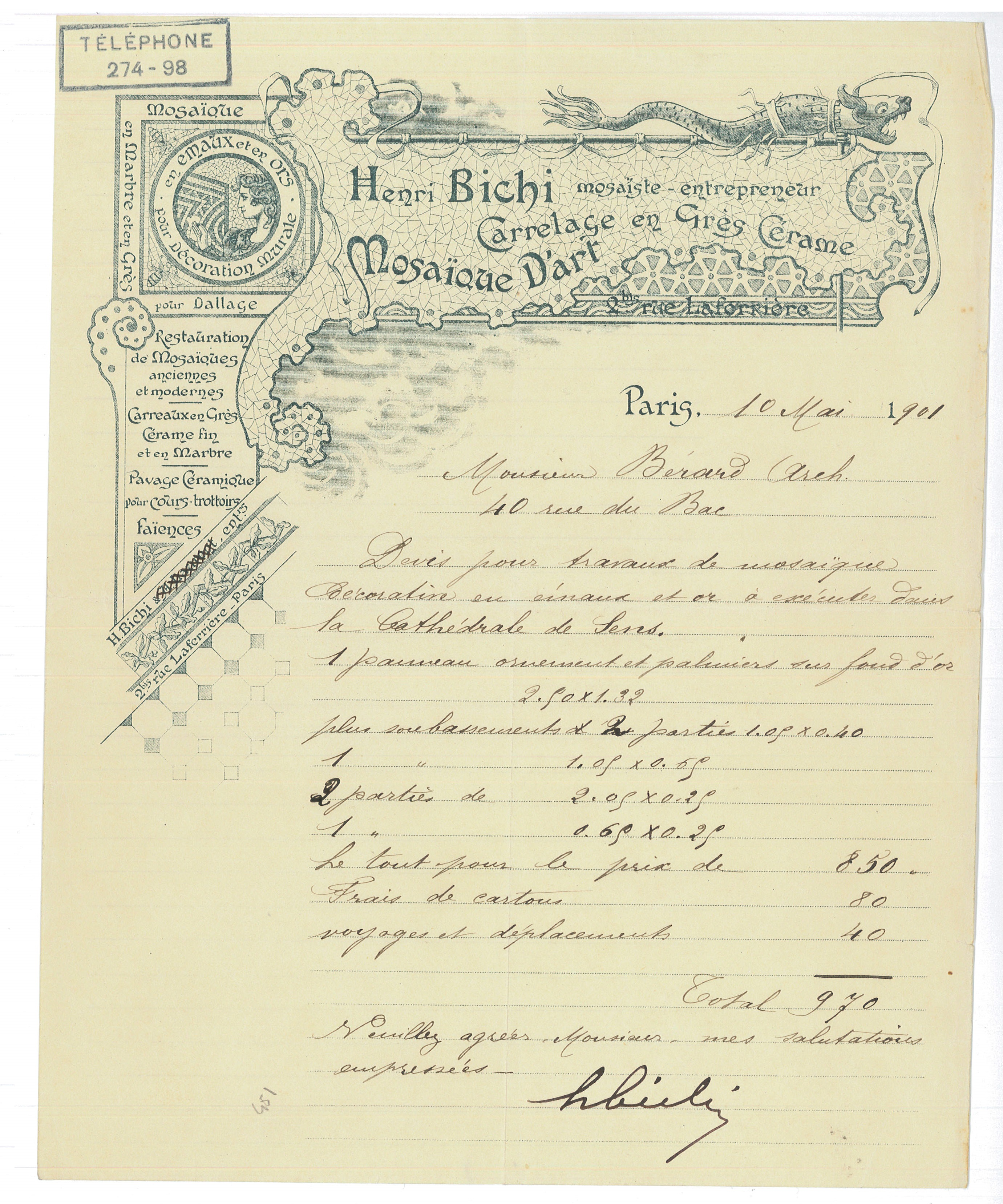 Signature du mosaïste Henri Bichi au bas d'un devis pour des travaux de mosaïque dans la cathédrale de Sens. Archives nationales, cote F/19/7886.